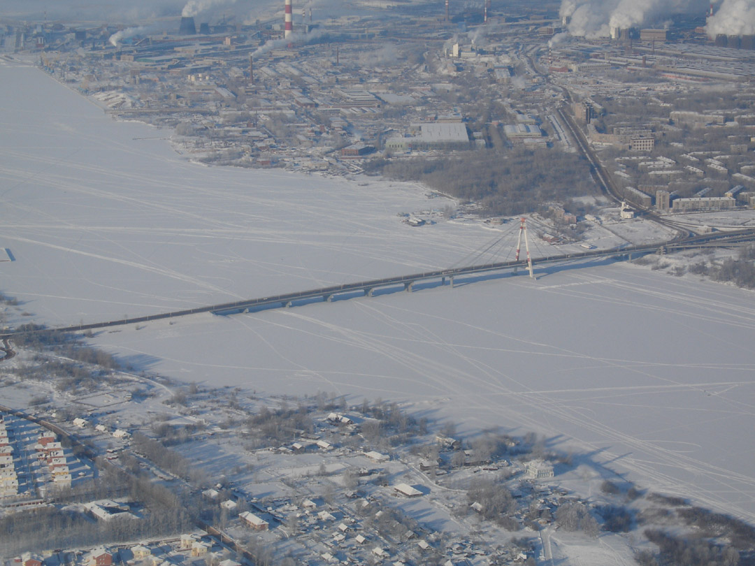 Город Череповец Вологодской области РФ. Вид с высоты птичьего полёта на мост через реку Шексна и западную часть Индустриального района города (вверху фото), в зимнее время. В нижнем левом углу фото видна часть посёлка Матурино.